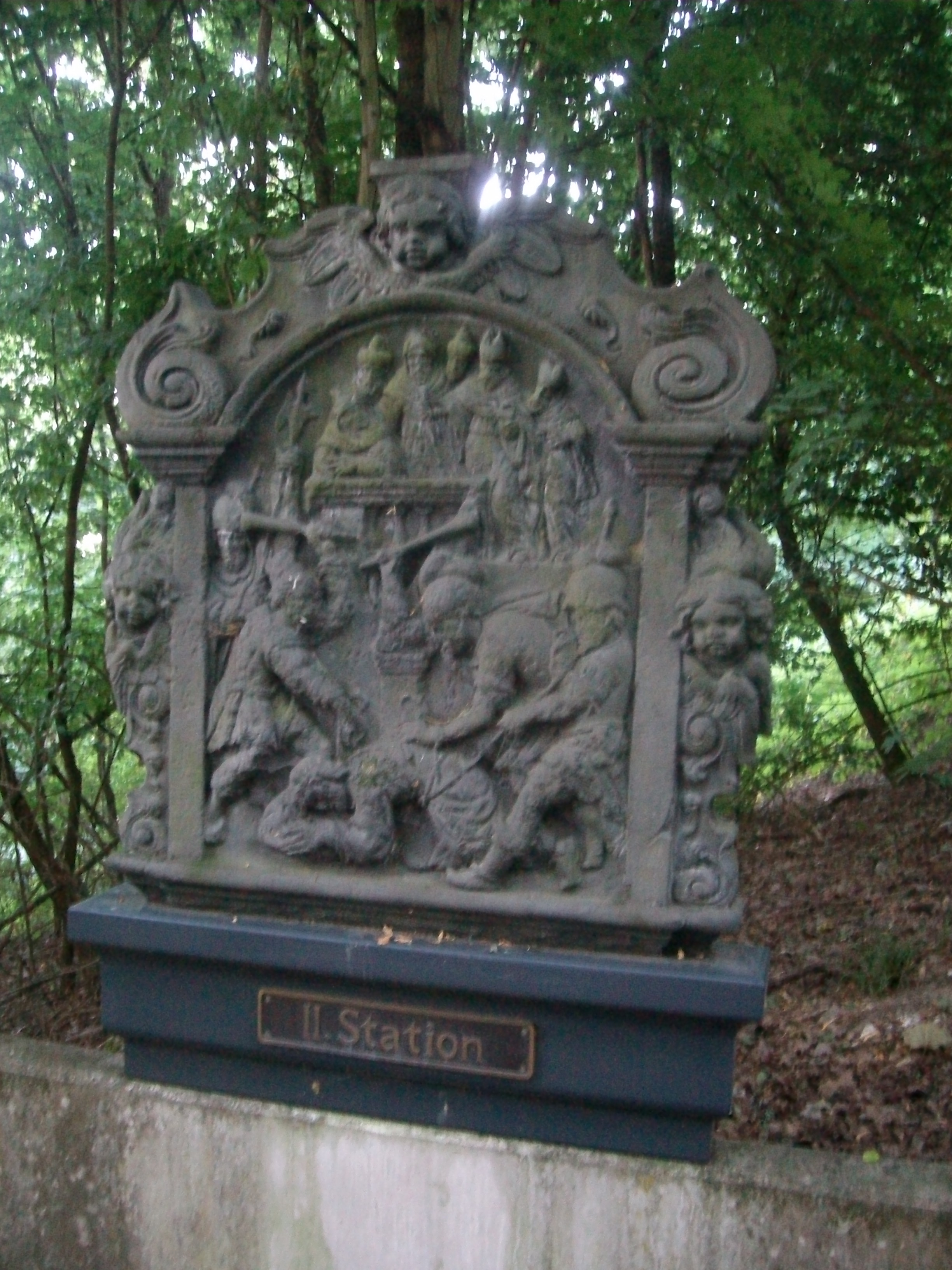 Kopie des Fußfalls an Station II des Kreuzwegs zur Kapelle auf dem Hofheimer Kapellenberg